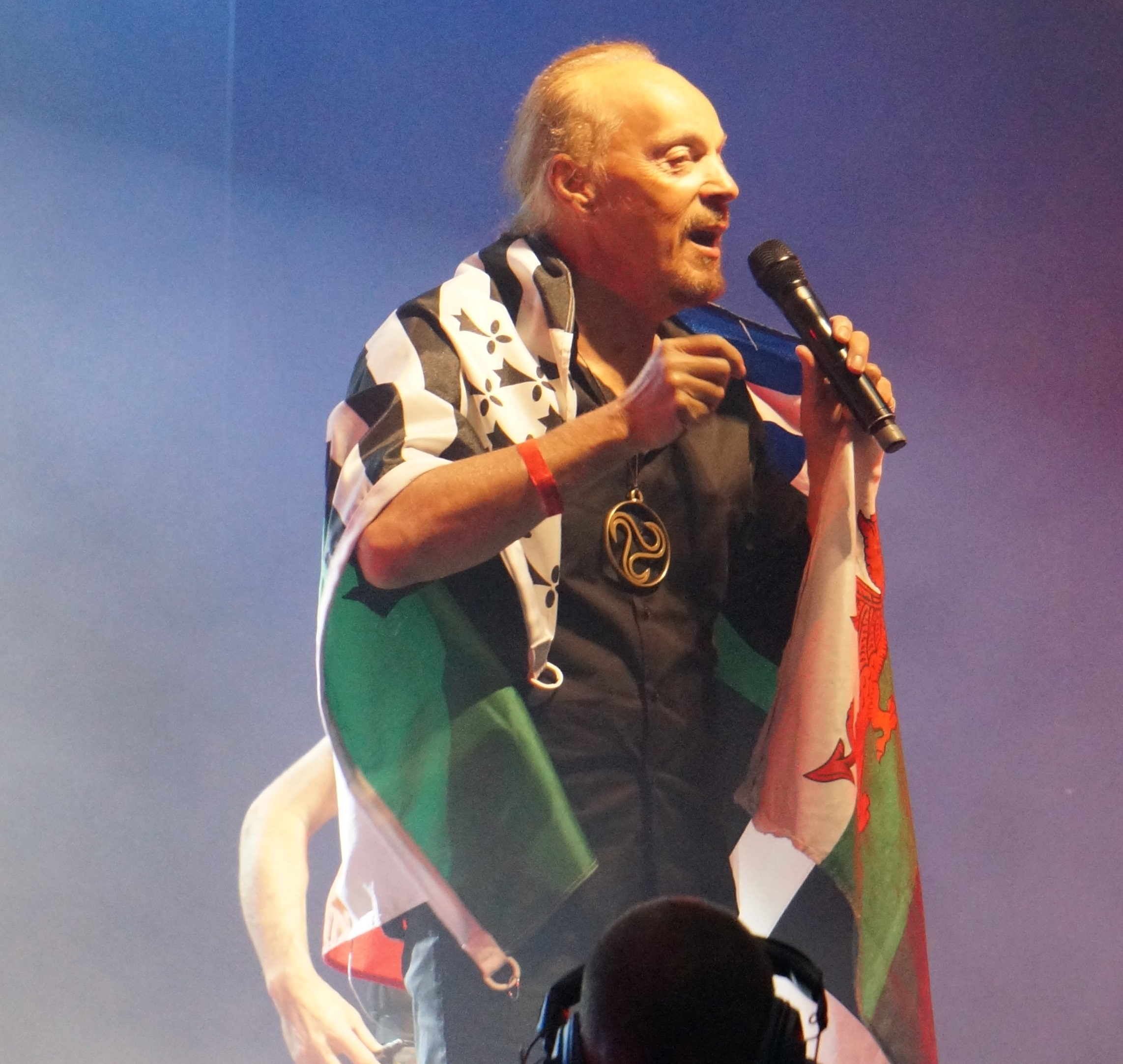 concert à Châlons.